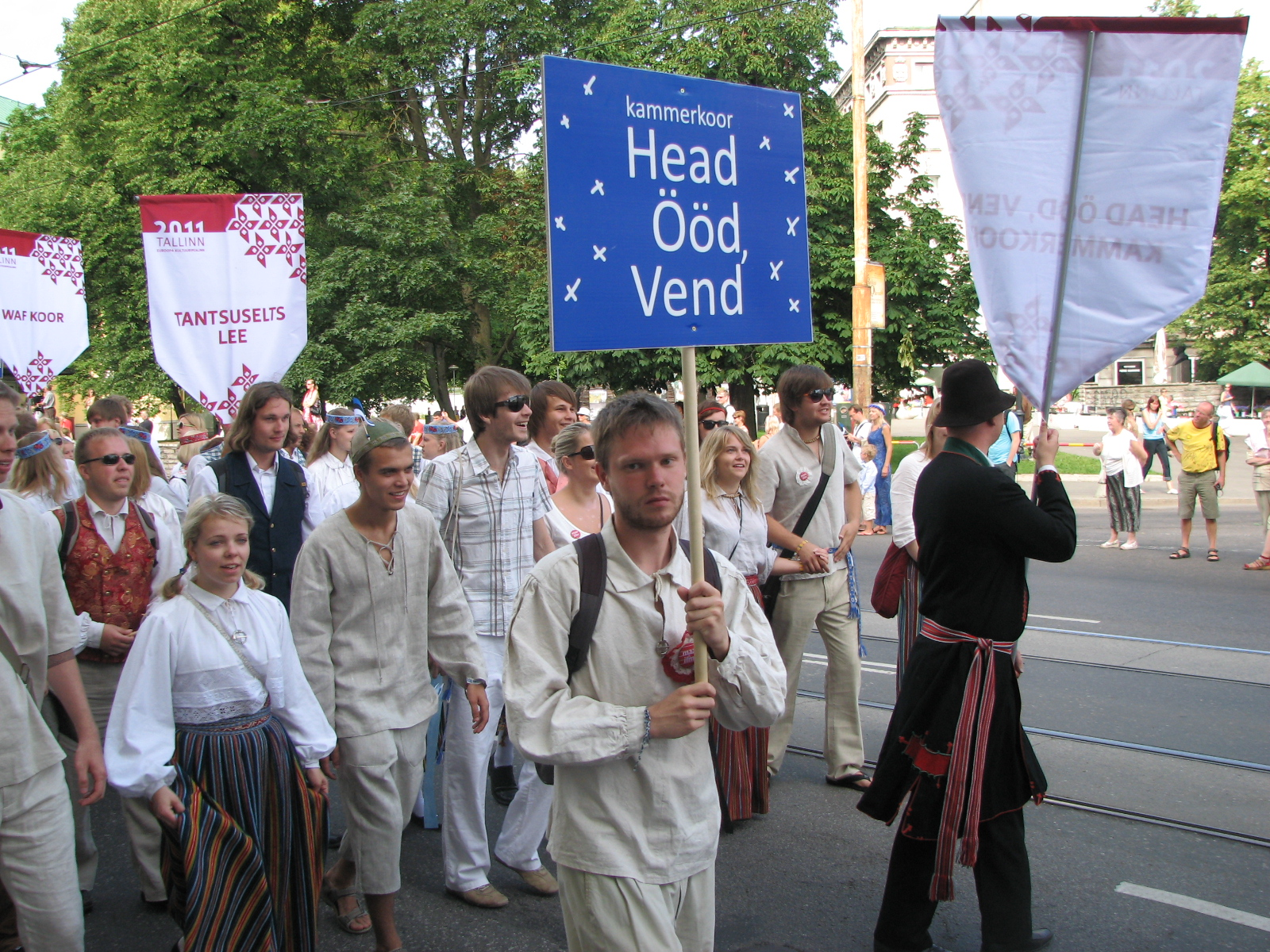 Kammerkoor Head Ööd, Vend XI noorte laulu- ja tantsupeo rongkäigus